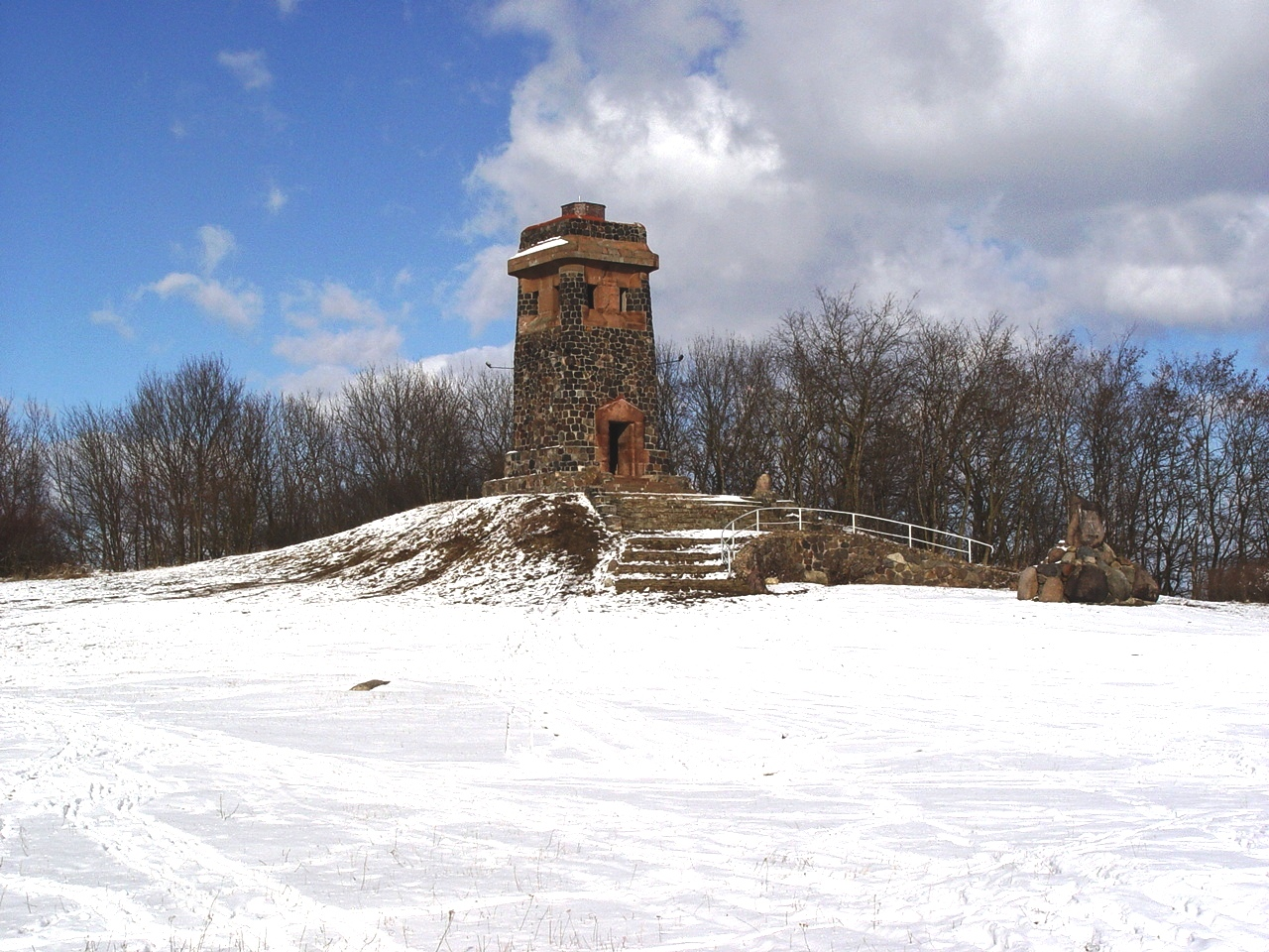 "Wartbergturm bei Irxleben"